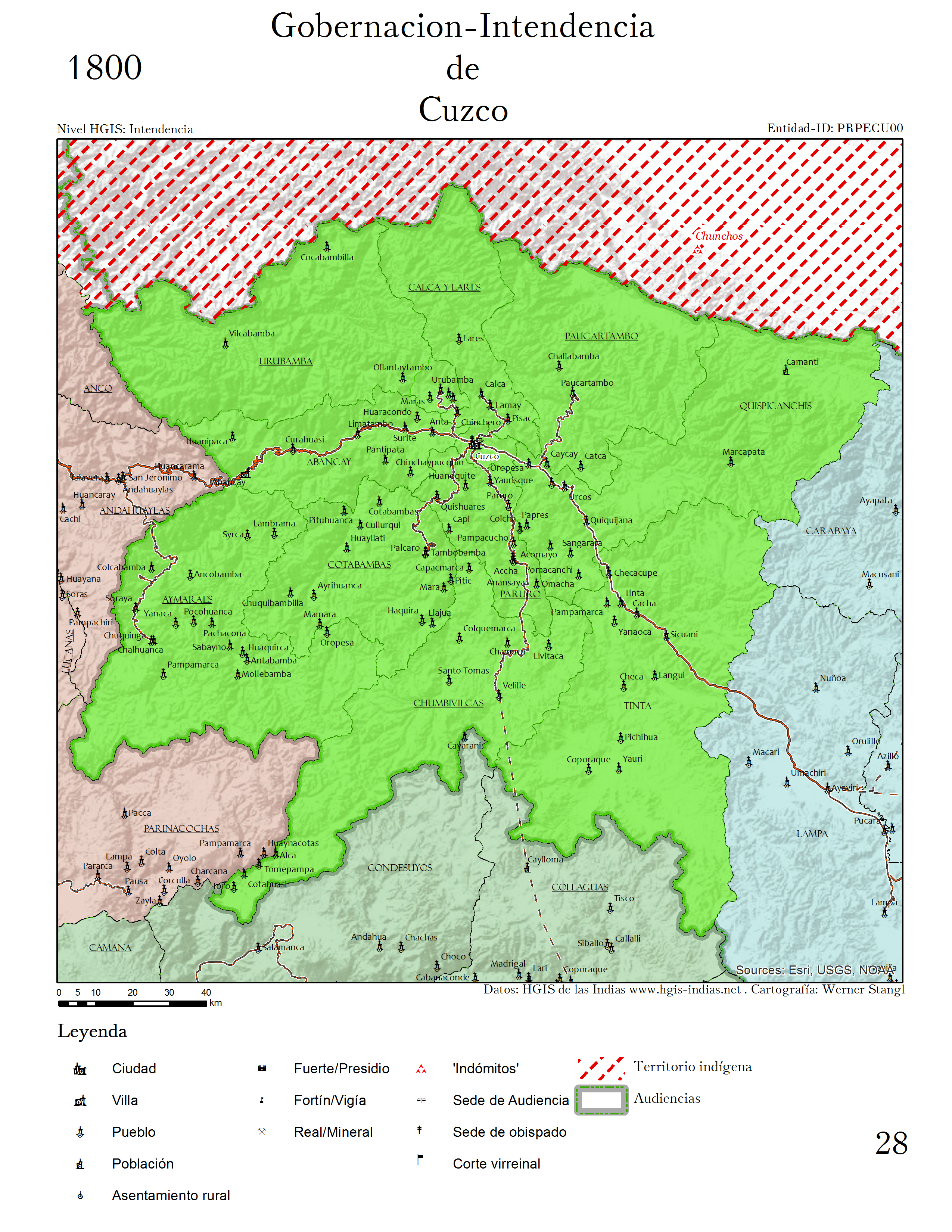 Intendencia de Cuzco con sus partidos y parroquias en 1800 (reconstruido por HGIS de las Indias).